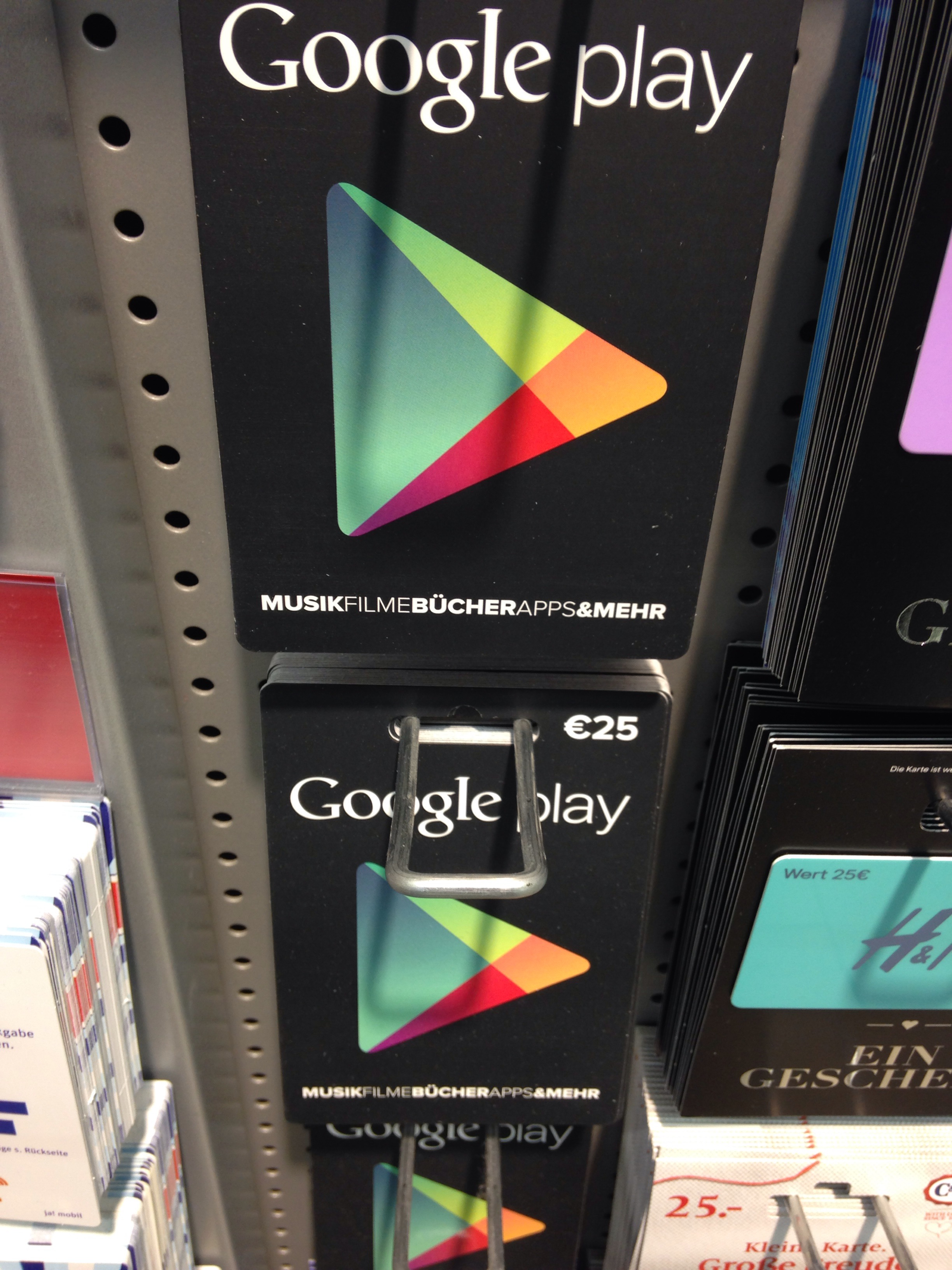 Google Play Gutscheinkarten